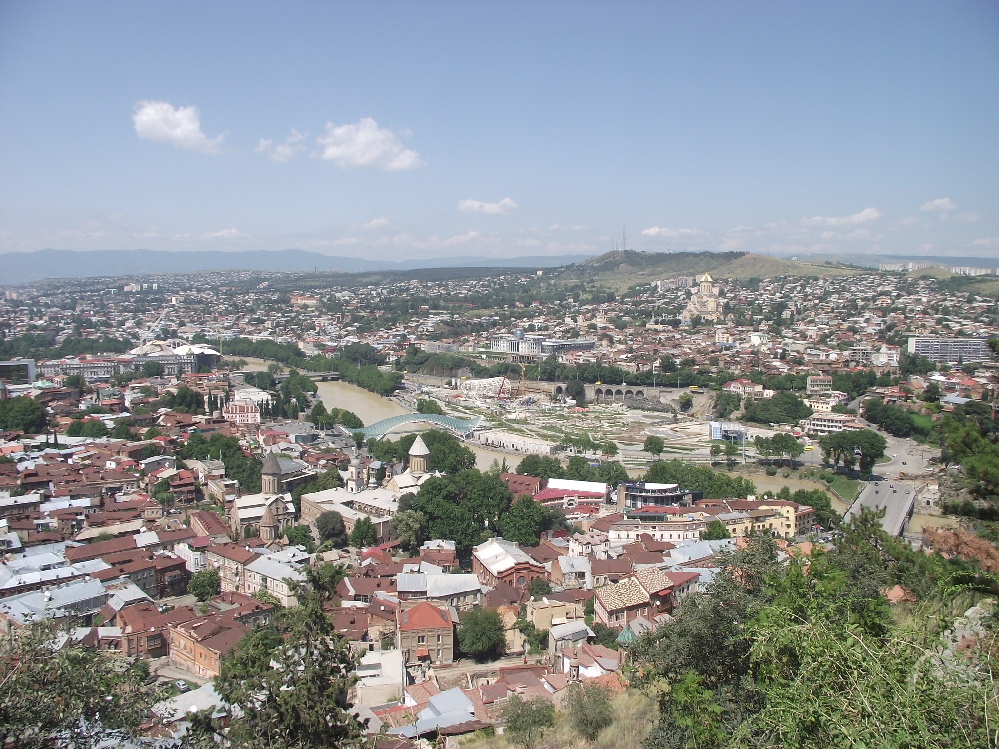 מבט מלמעלה על טביליסי